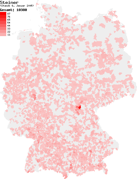 Verteilung des Nachnamens Steiner in Deutschland nach dem Telefonbuch mit Stand vom 6. Januar 2005